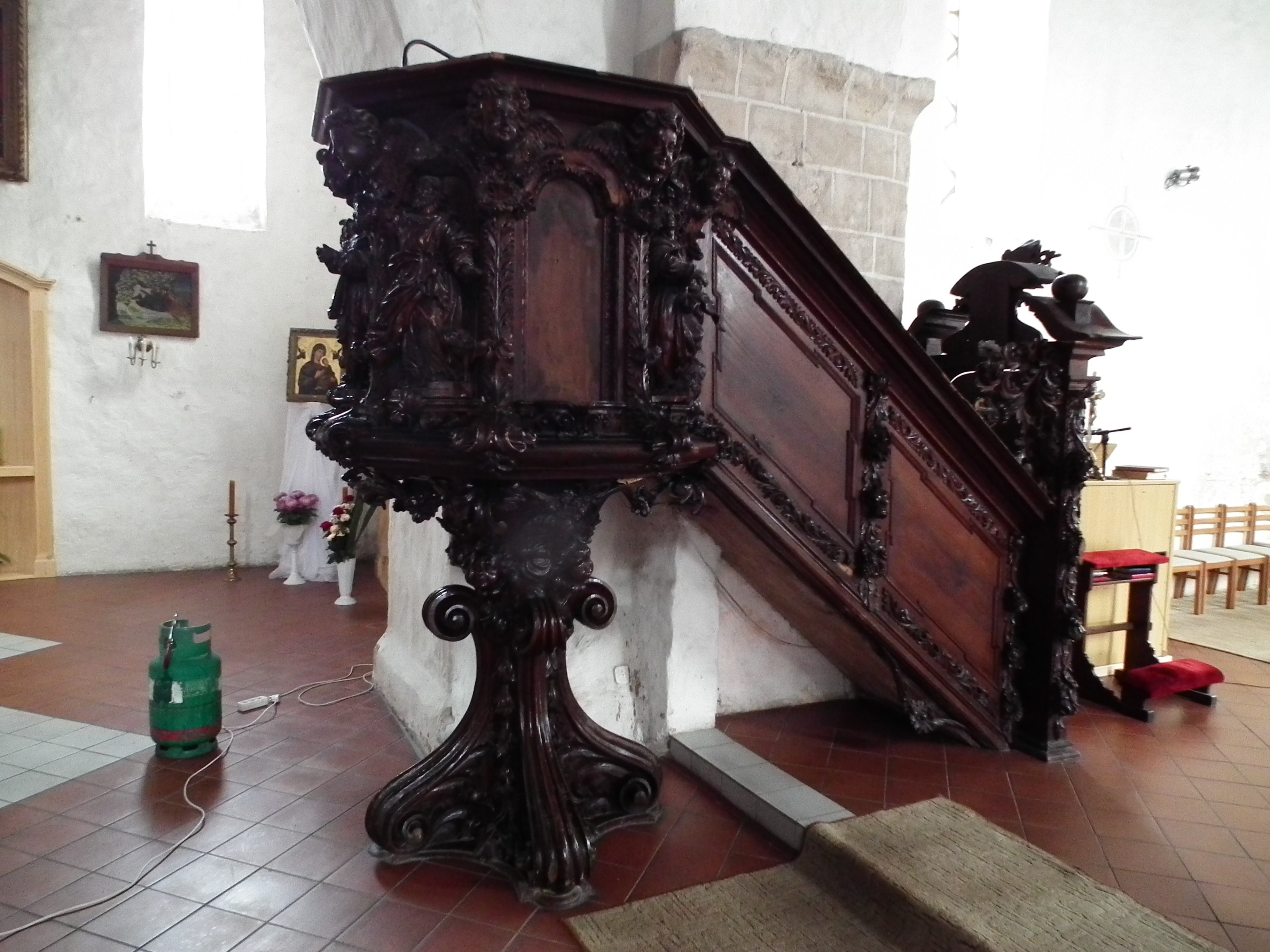 Kościół Ducha Świętego w Moryniu.